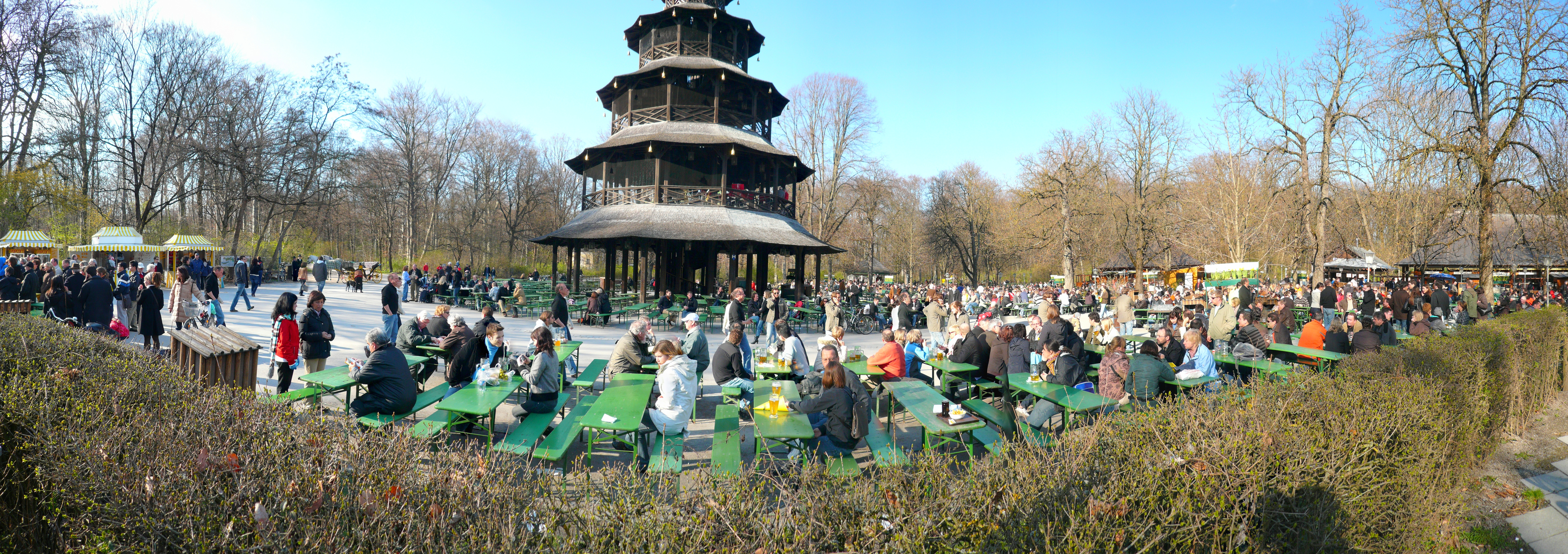 Beergarden at Chinesischer Turm, Munich